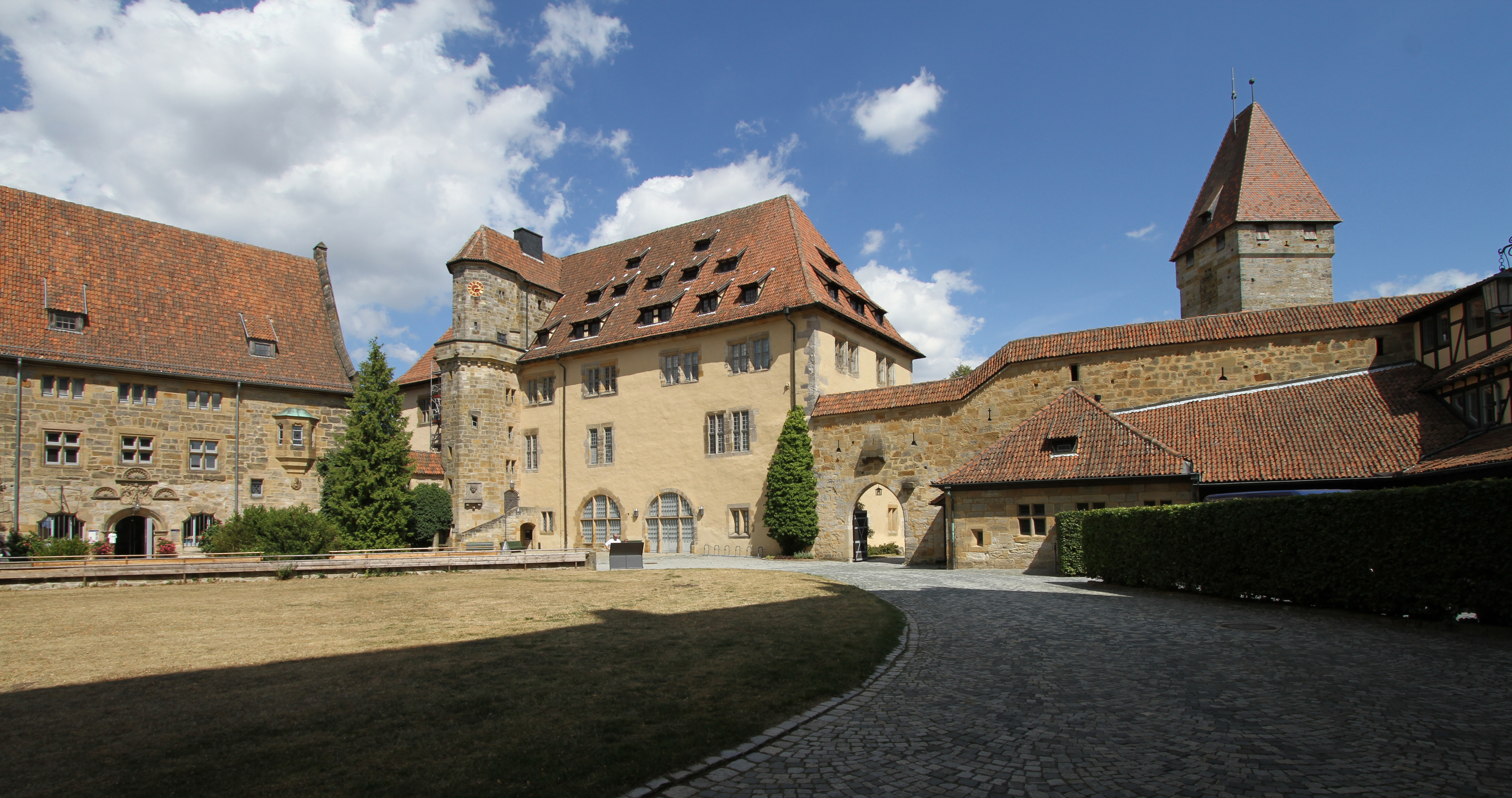 Veste Coburg